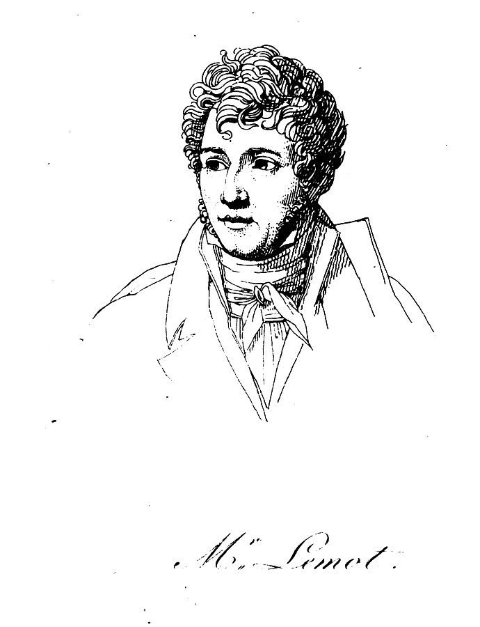 Croquis de Lemot par Fremy d'après un portrait